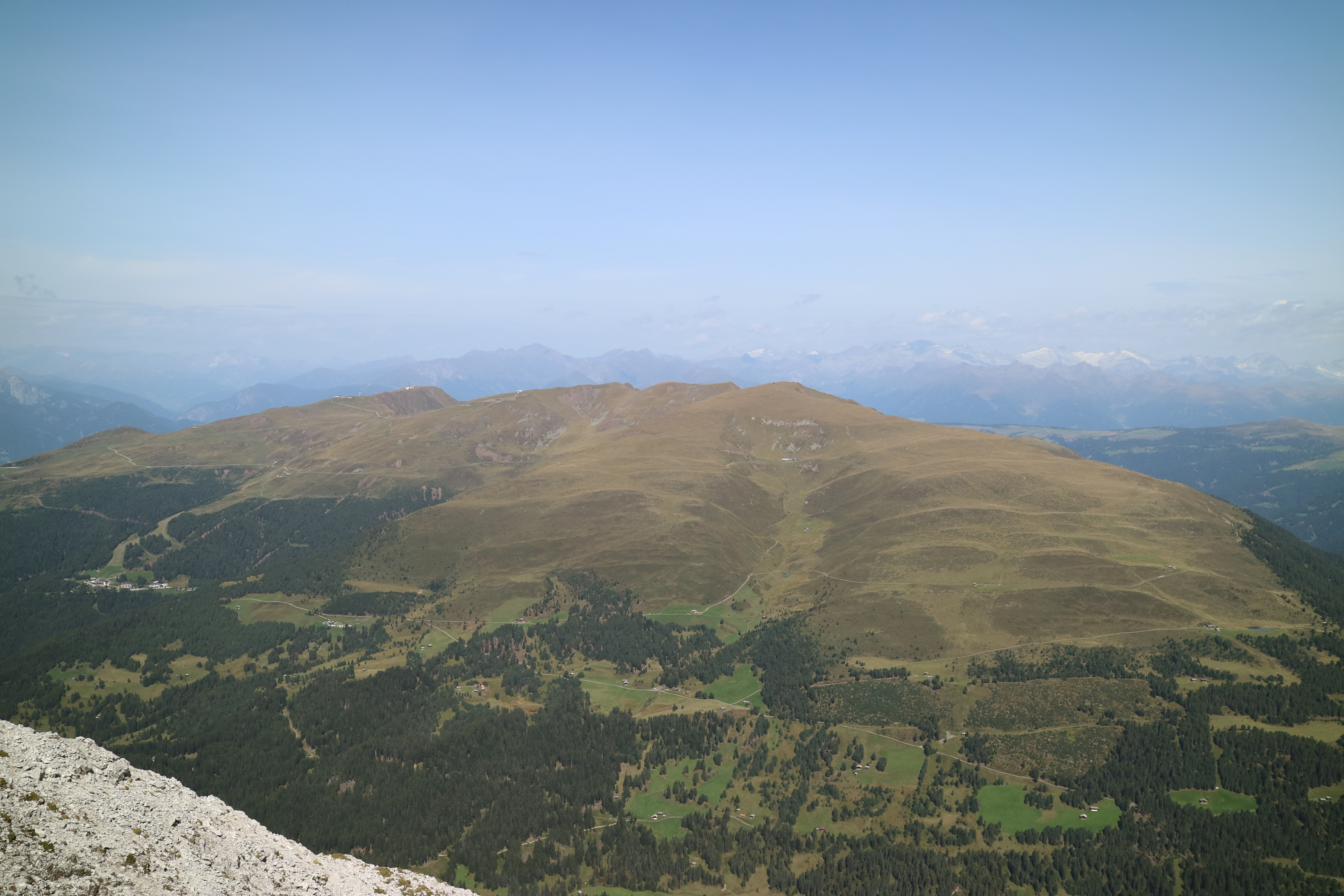 Plose von Süden (Tullen), Aferer Geisler, Peitlerkofelgruppe, Südtirol